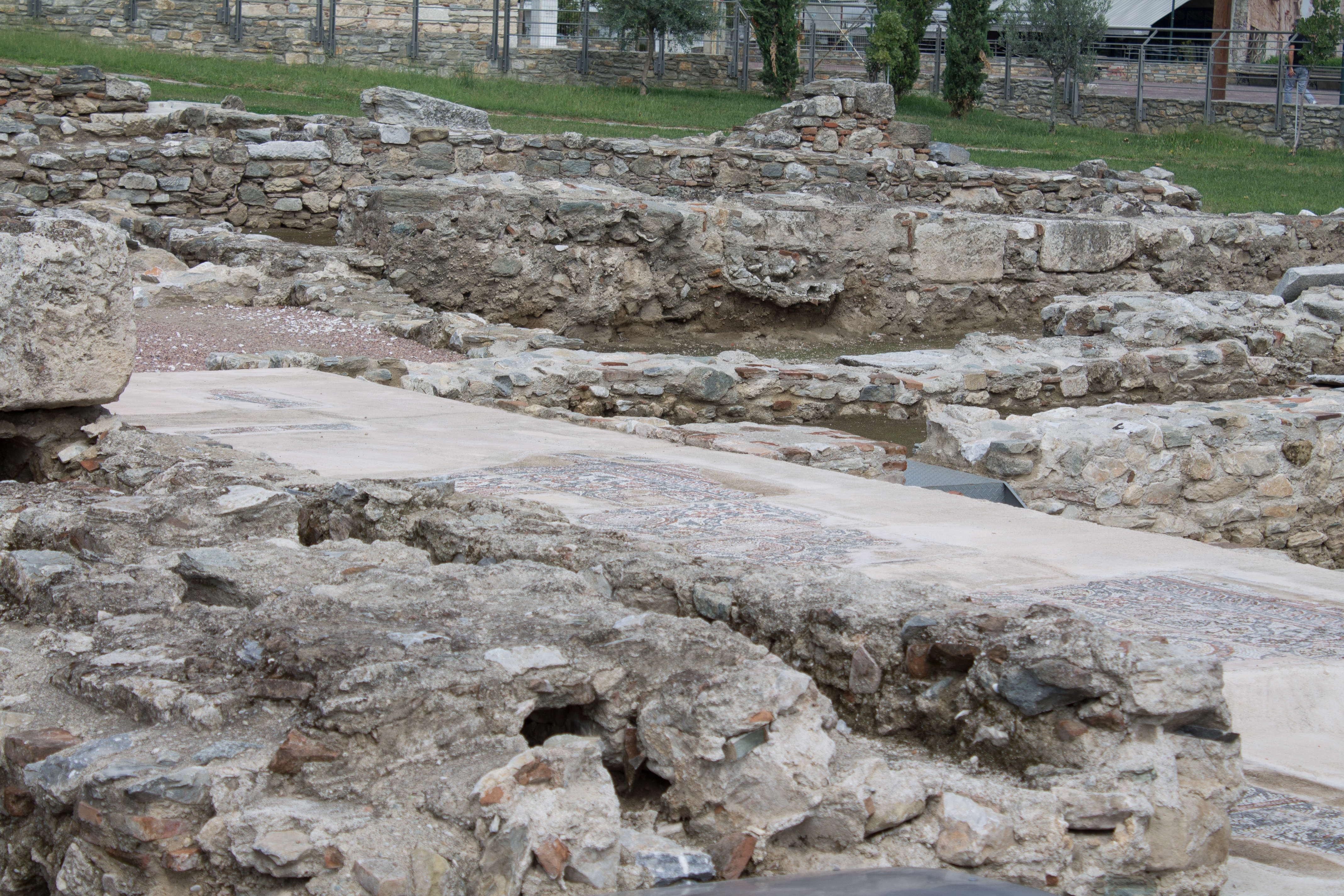 Νάρθηκας παλαιοχριστιανική βασιλικής Αγίου Αχιλλείου«Αρχαιολογικός χώρος Φρουρίου Λάρισας»